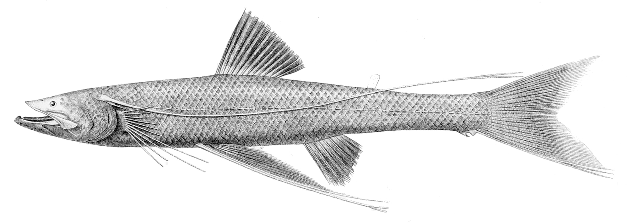 Bathypterois dubius